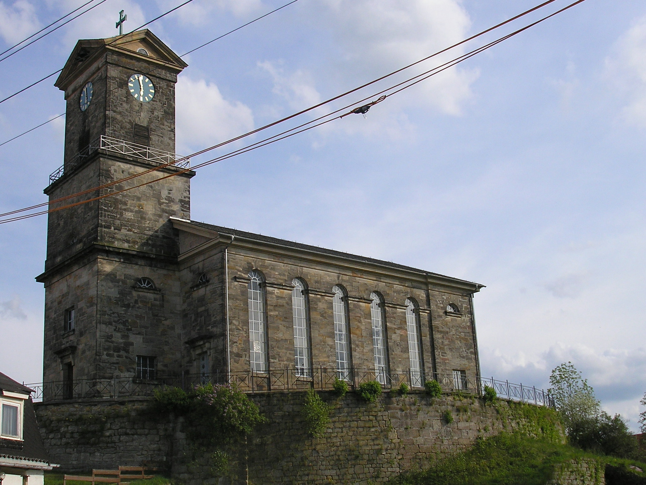 Kirche von Gräfinau-Angstedt (Thüringen).